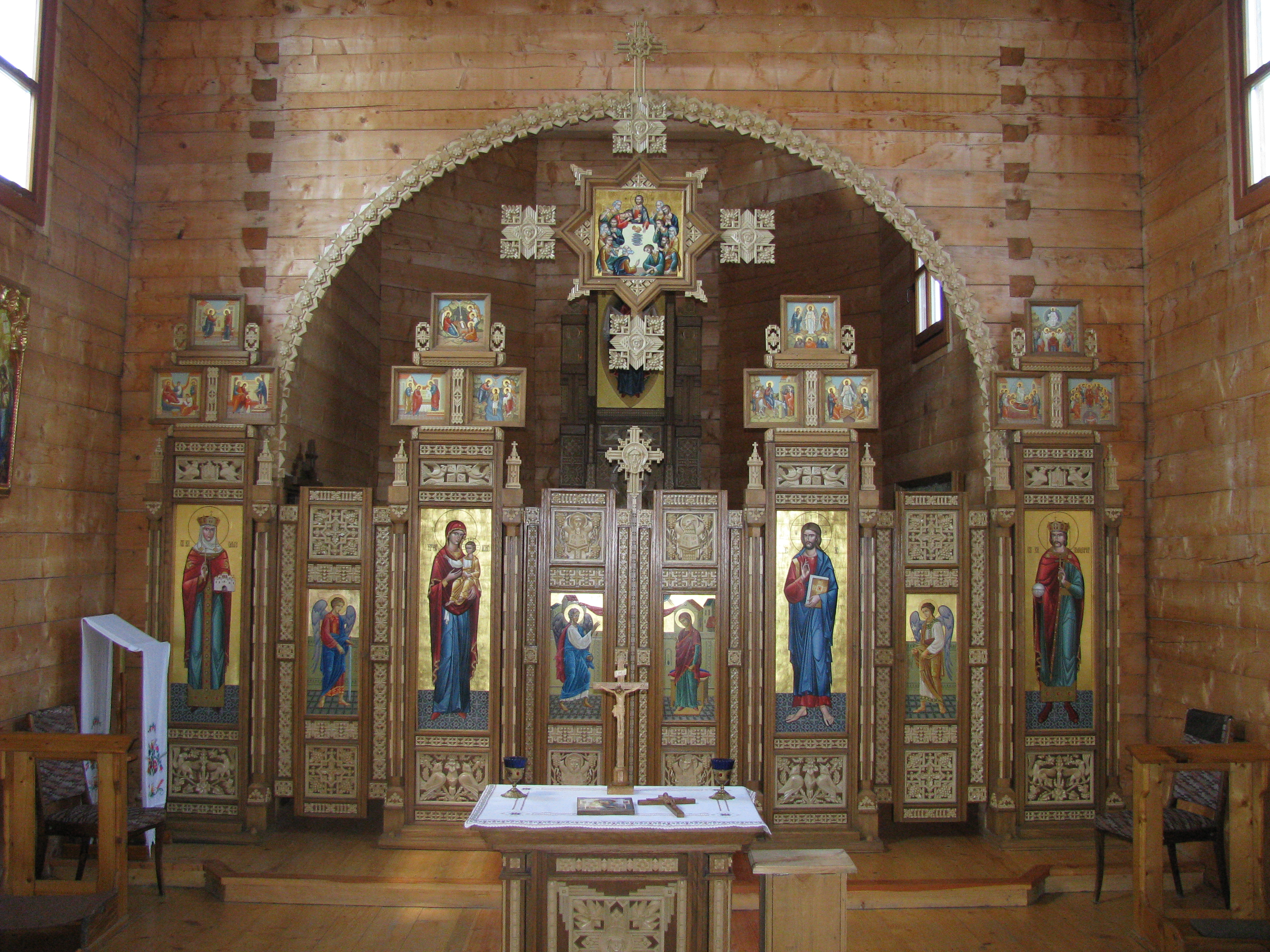 Василіянський монастир (мур.), с.Крехів